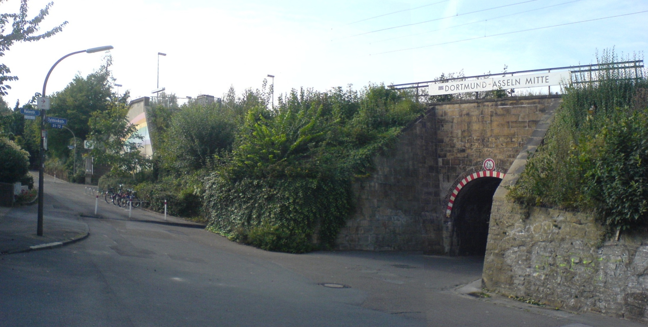 Bahnhof Dortmund-Asseln Mitte